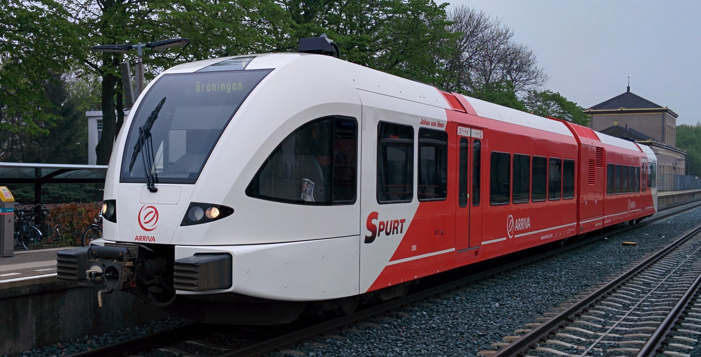 Spurt Johan van Veen (nr. 10250), op station Zuidbroek, die vooruitlopend op de verlenging tot driewagentreinstel al vernummerd is in 350.